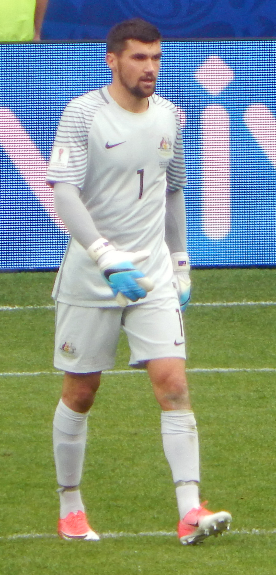 Мэтью Райан Матч Чили – Австралия